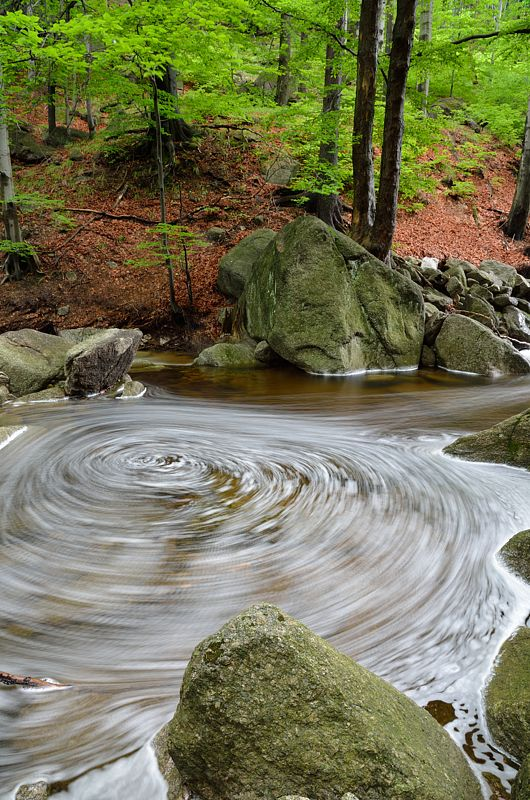 Hájený potok pod prvním můstkem